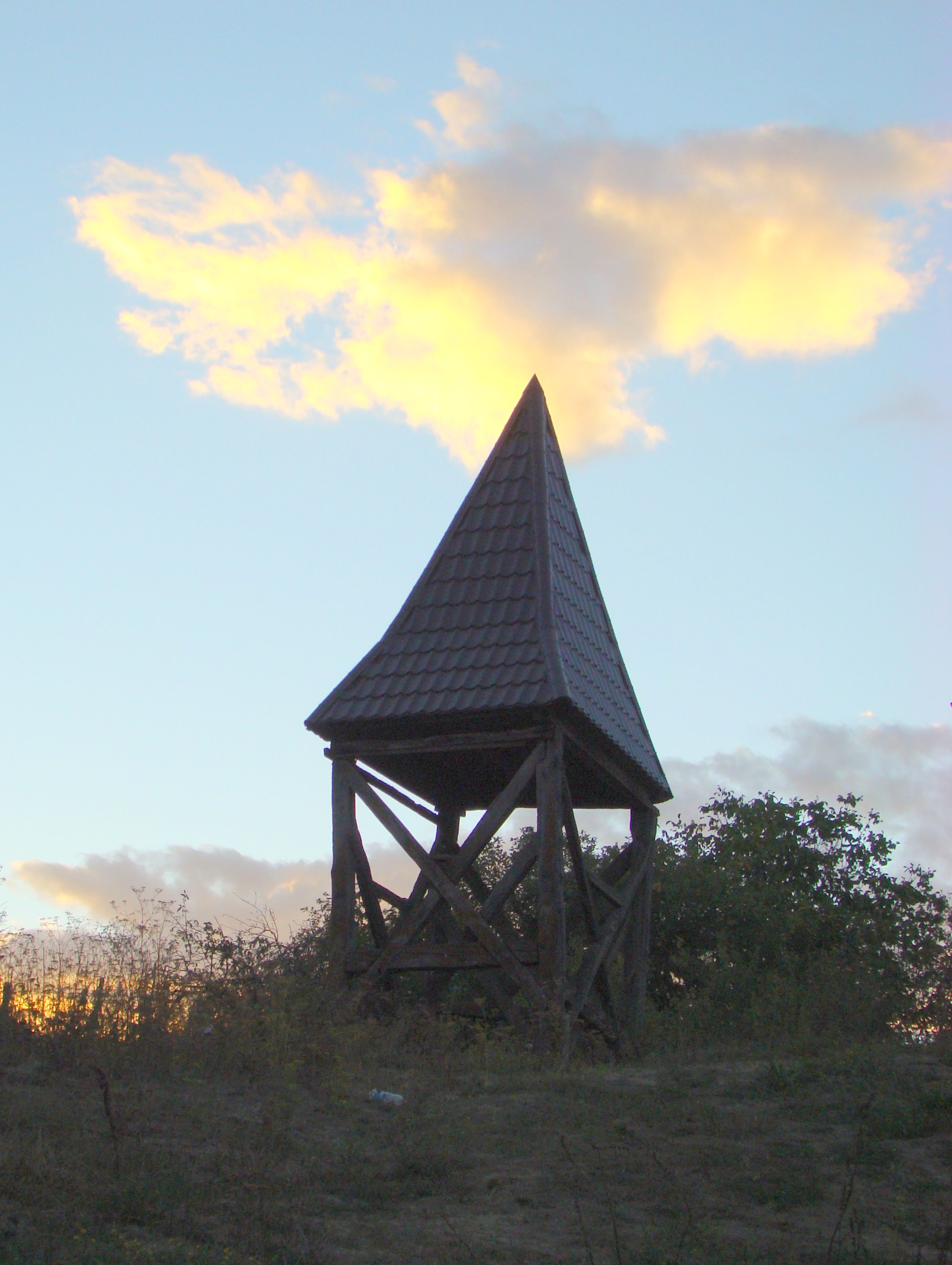 Turn-clopotniţă din lemn, sat CORVINEŞTI; comuna MATEI 02